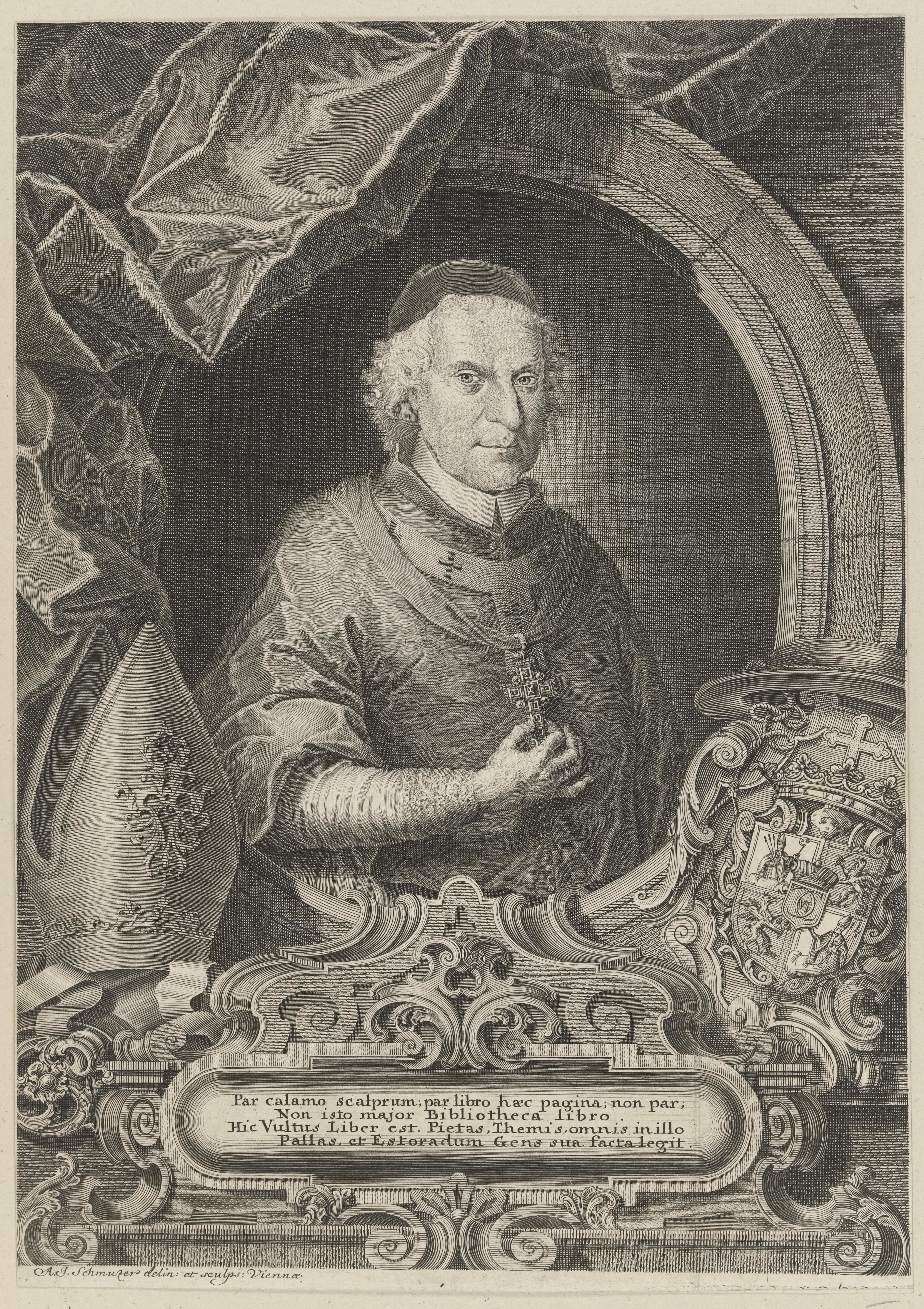 Bildnis des Sigismund Graf von Kollonitsch